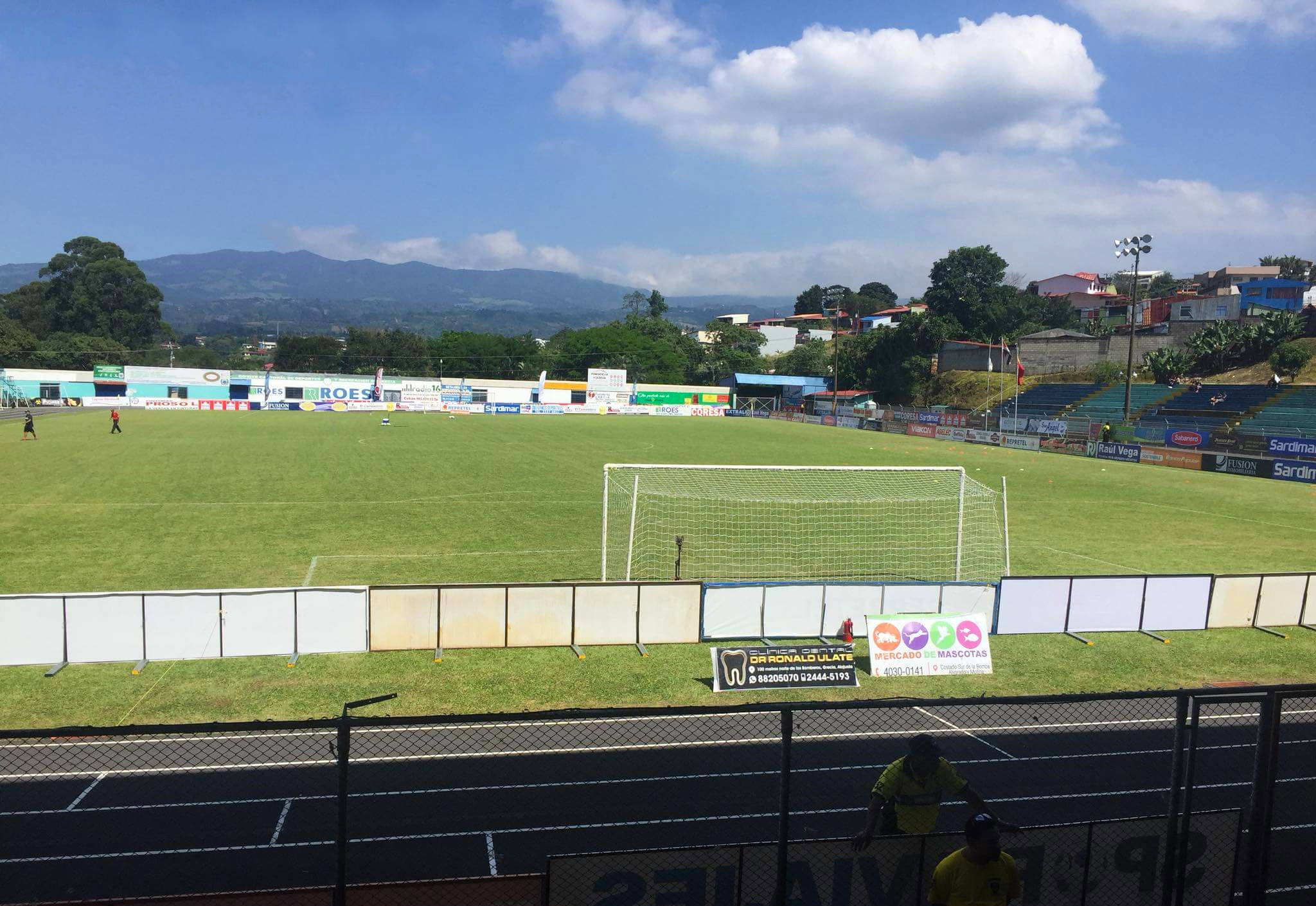 19-11-2017. Estadio Allen Riggioni del Municipal Grecia en un encuentro de Primera División de Costa Rica.